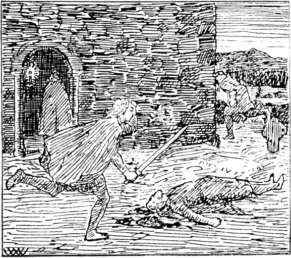 Wilhelm Wetlesen: Illustration for Haraldsønnenes saga (Inges saga), Heimskringla 1899-edition. nn: «Alv Rode hemnar far sin.»